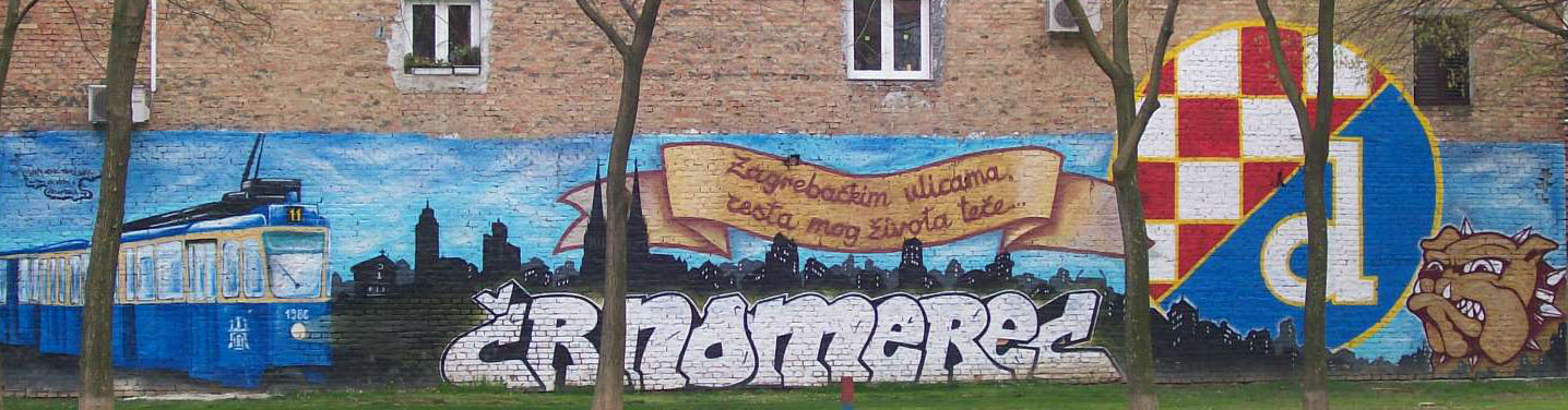 Grafit Dinamo Črnomerec